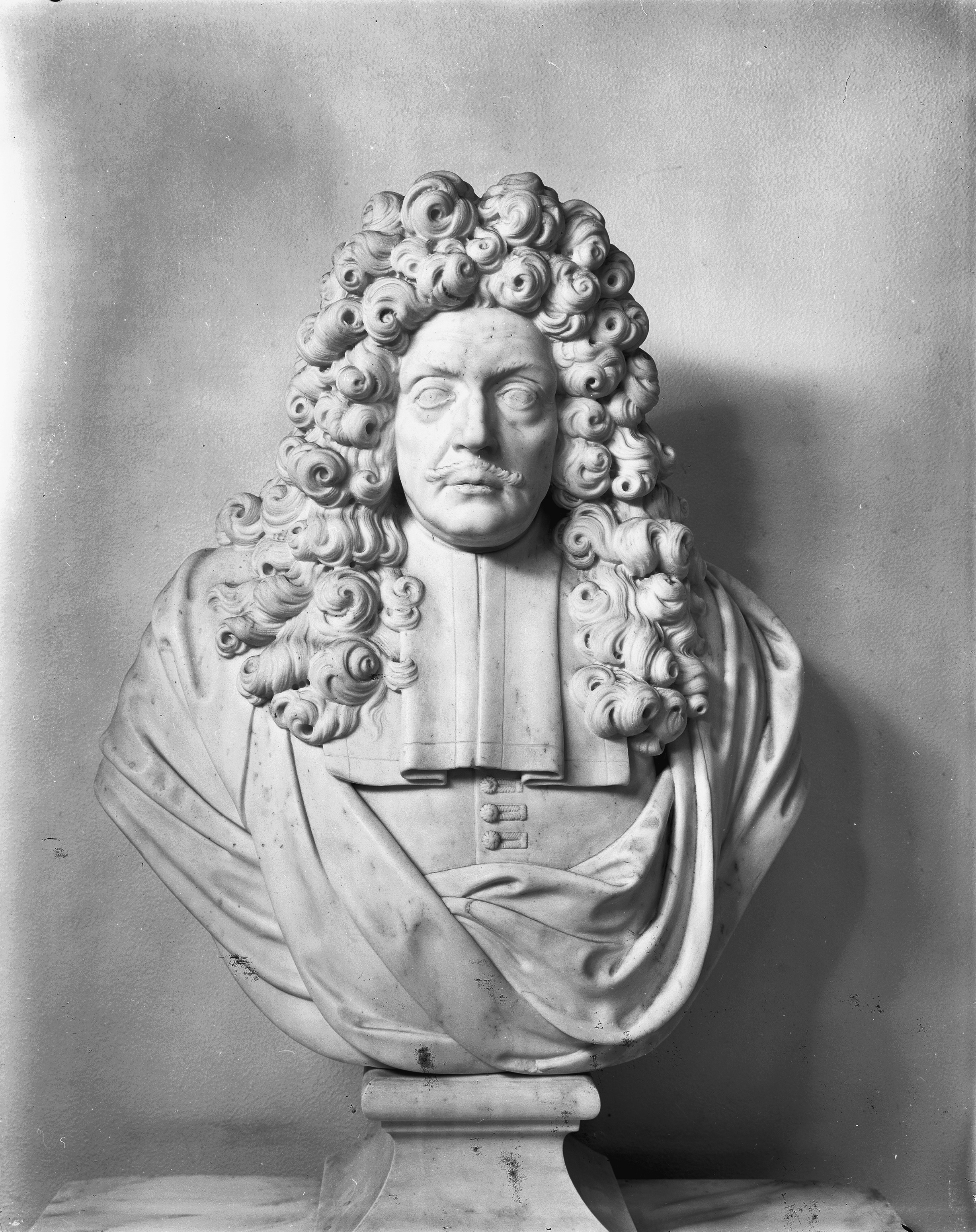 v.m. Raadhuis Paleis oude tekeningen en gravures: buste van J. Huydecoper in de hal This tag does not indicate the copyright status of the attached work. A normal copyright tag is still required. See Commons:Licensing.